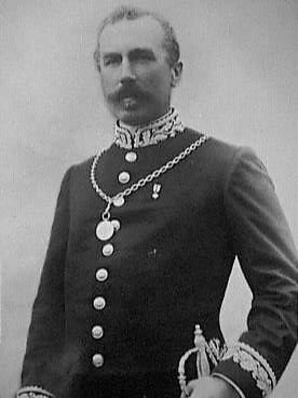 C.F.J.H. Hengst, burgemeester van Boxmeer (1890-1921)